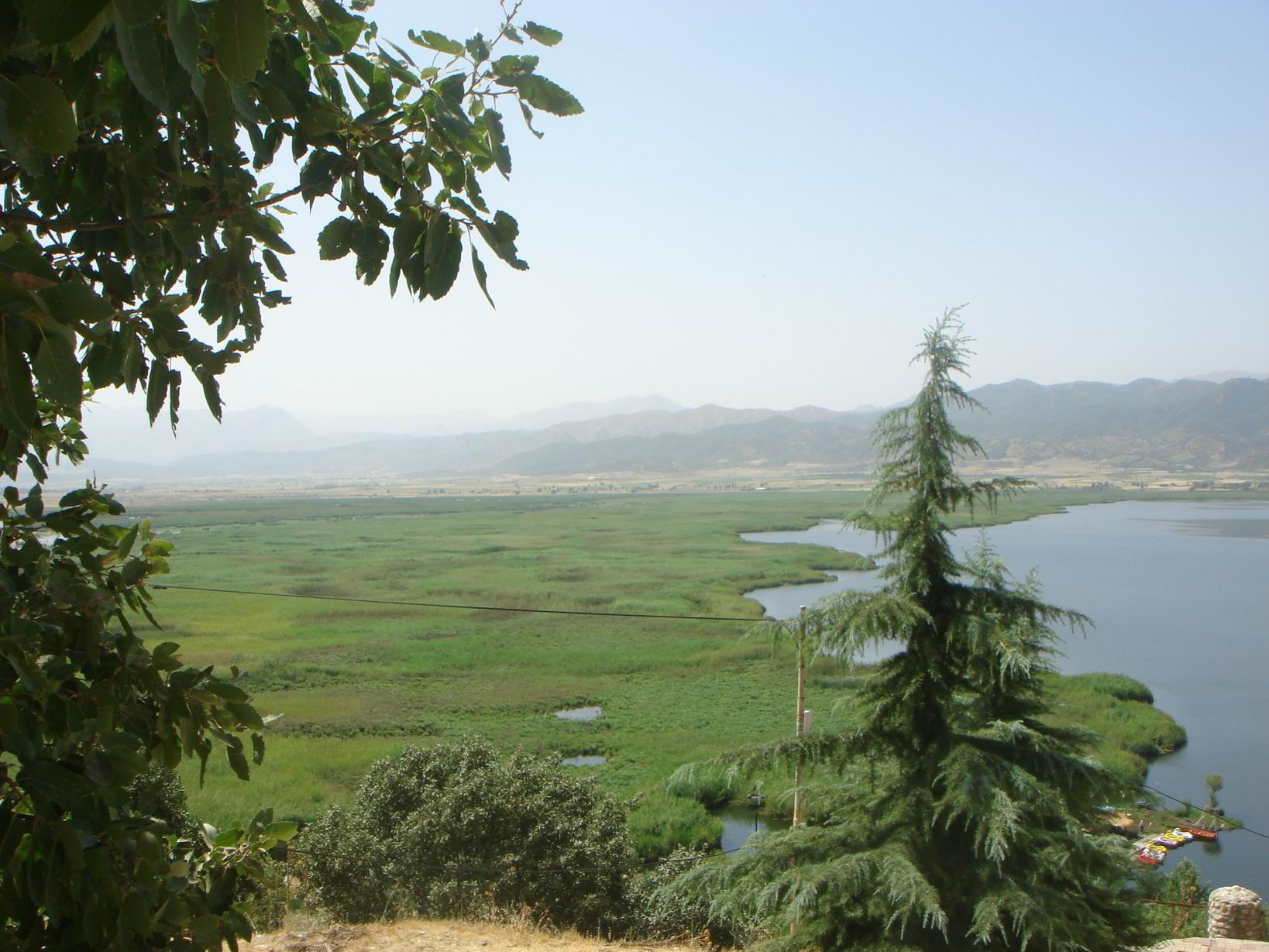 Zarivar Lake - Marivan -Iran عکاس علی افضلی